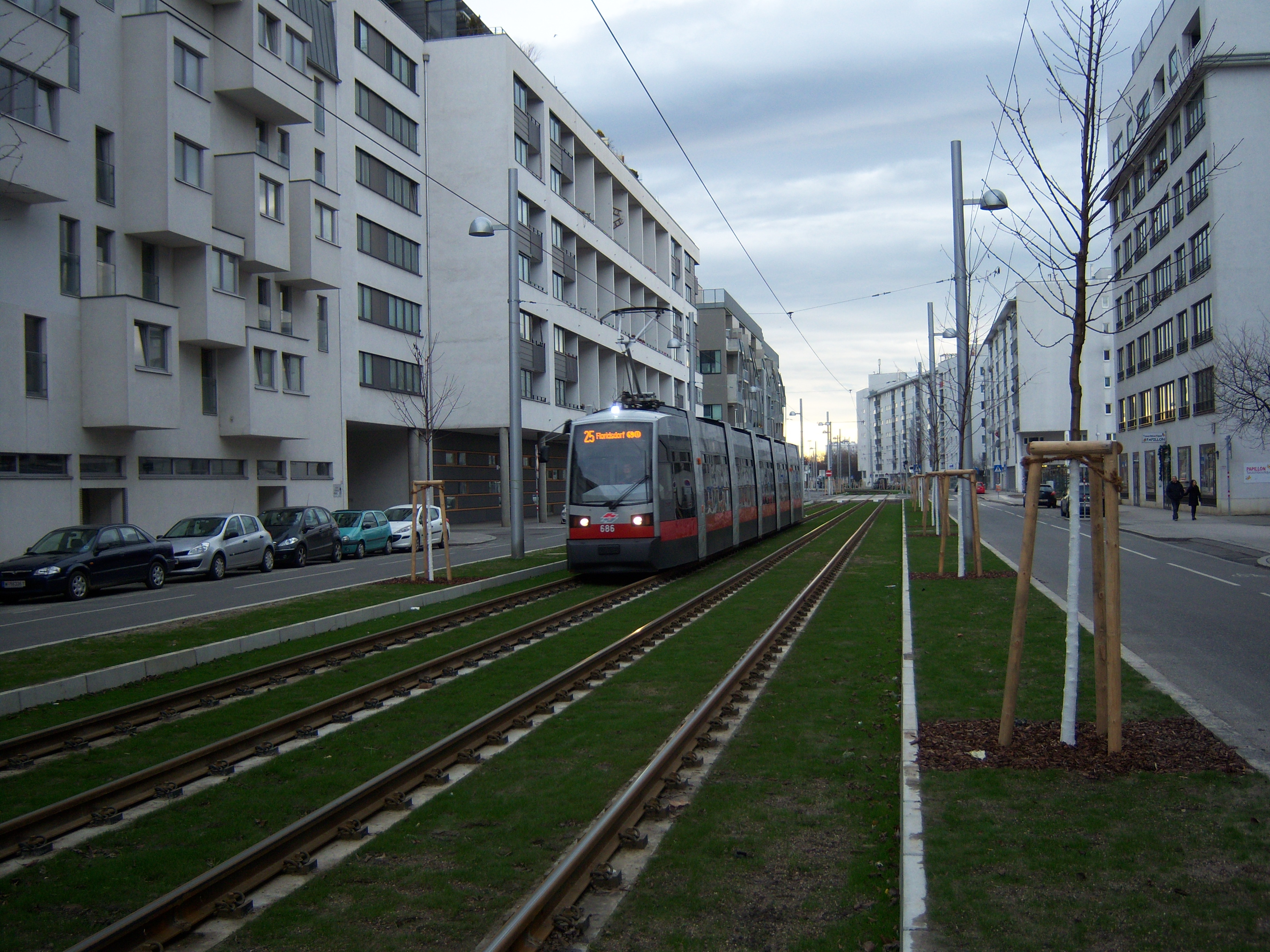 Ein Zug der Linie 25 auf der Ende 2012 eröffneten Straßenbahnstrecke in der Tokiostraße